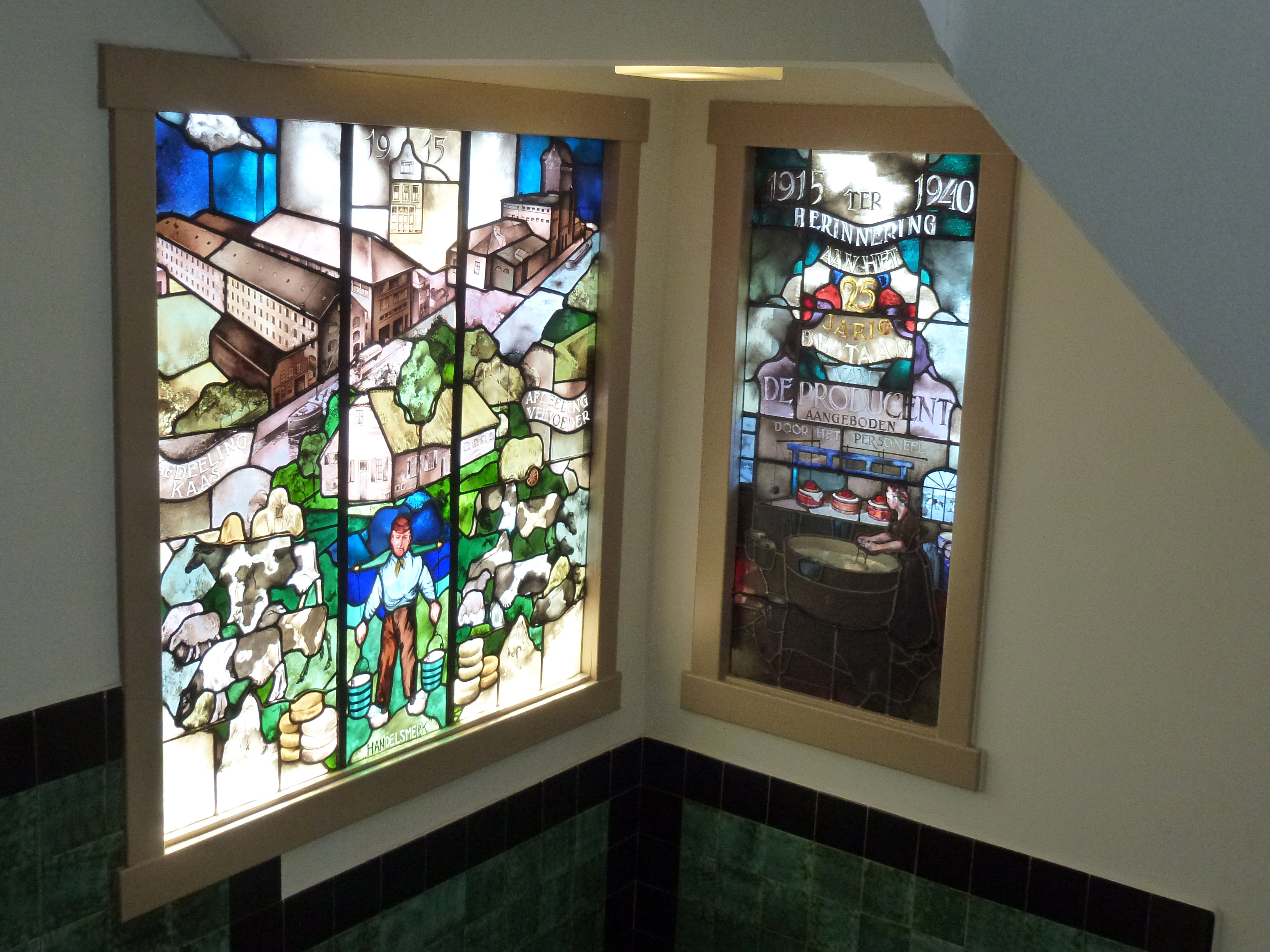 Kaaspakhuis De Producent in Gouda. Glas-in-lood ramen van Willem Bogtman Op het linker glas-in-lood raam wordt de geschiedenis van De Producent verbeeld met daarbij de tekst: 1915, afdeling kaas, afdeling veevoeder en onderaan hun handelsmerk: Een boer met een juk en twee emmers. Het rechter glas-in-lood raam is aangeboden door het personeel. De tekst: 1915, 1940, Ter herinnering an het 25 jarig bestaan van De Producent. Aangeboden door het personeel. Daaronder zie je een deel van de kaasbereiding en drie kaaspersen.